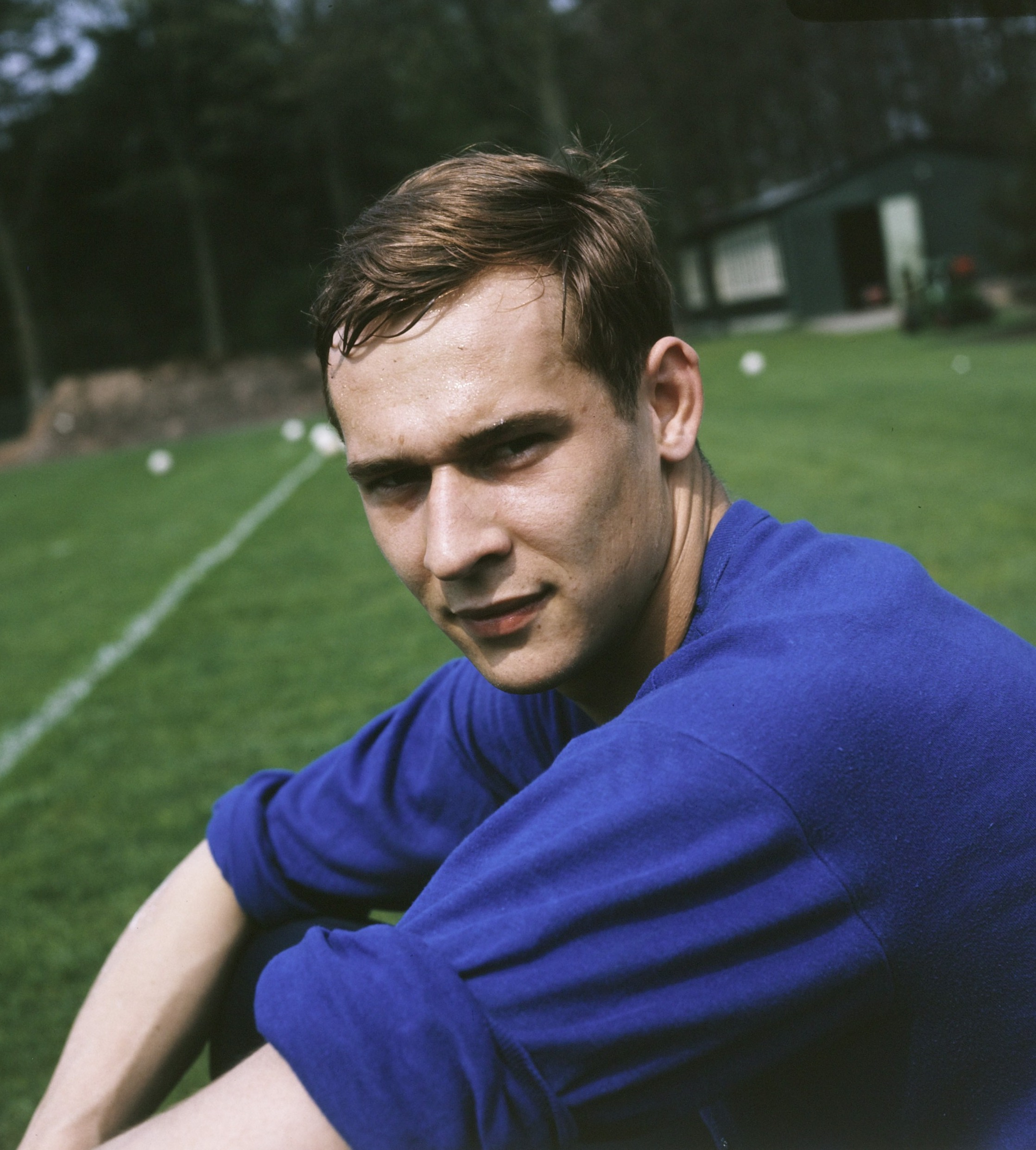 Training Nederlands Elftal te Zeist; Jan van Beveren (keeper)